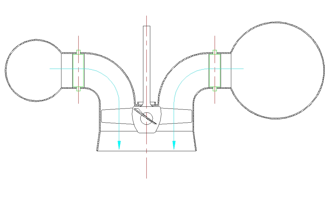 Sezione longitudinale di turbina Kaplan